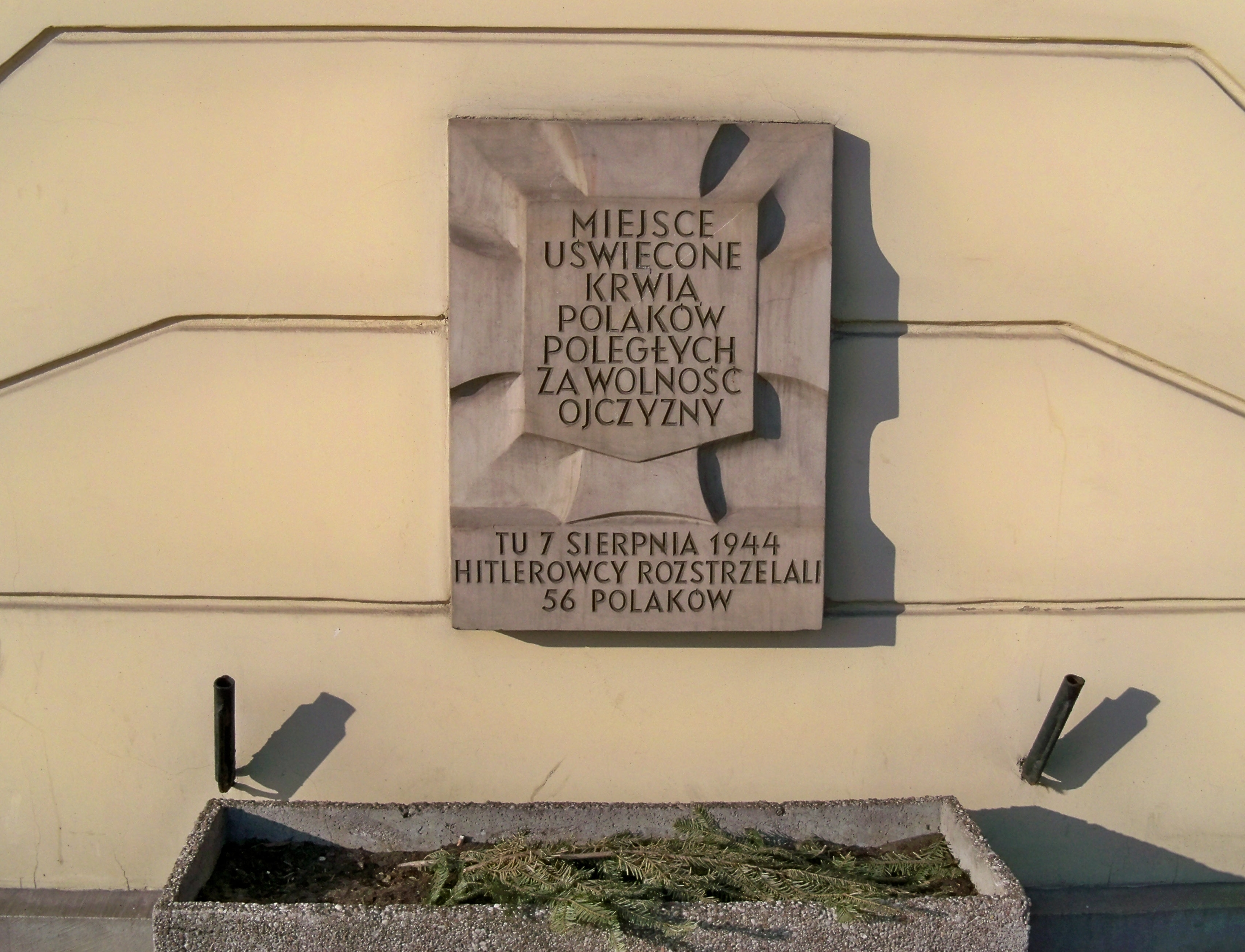 Tablica upamiętniająca rozstrzelanie 56 Polaków przez hitlerowców 7 sierpnia 1944 r. Al. Niepodległości 210 w Warszawie, od strony Trasy Łazienkowskiej.